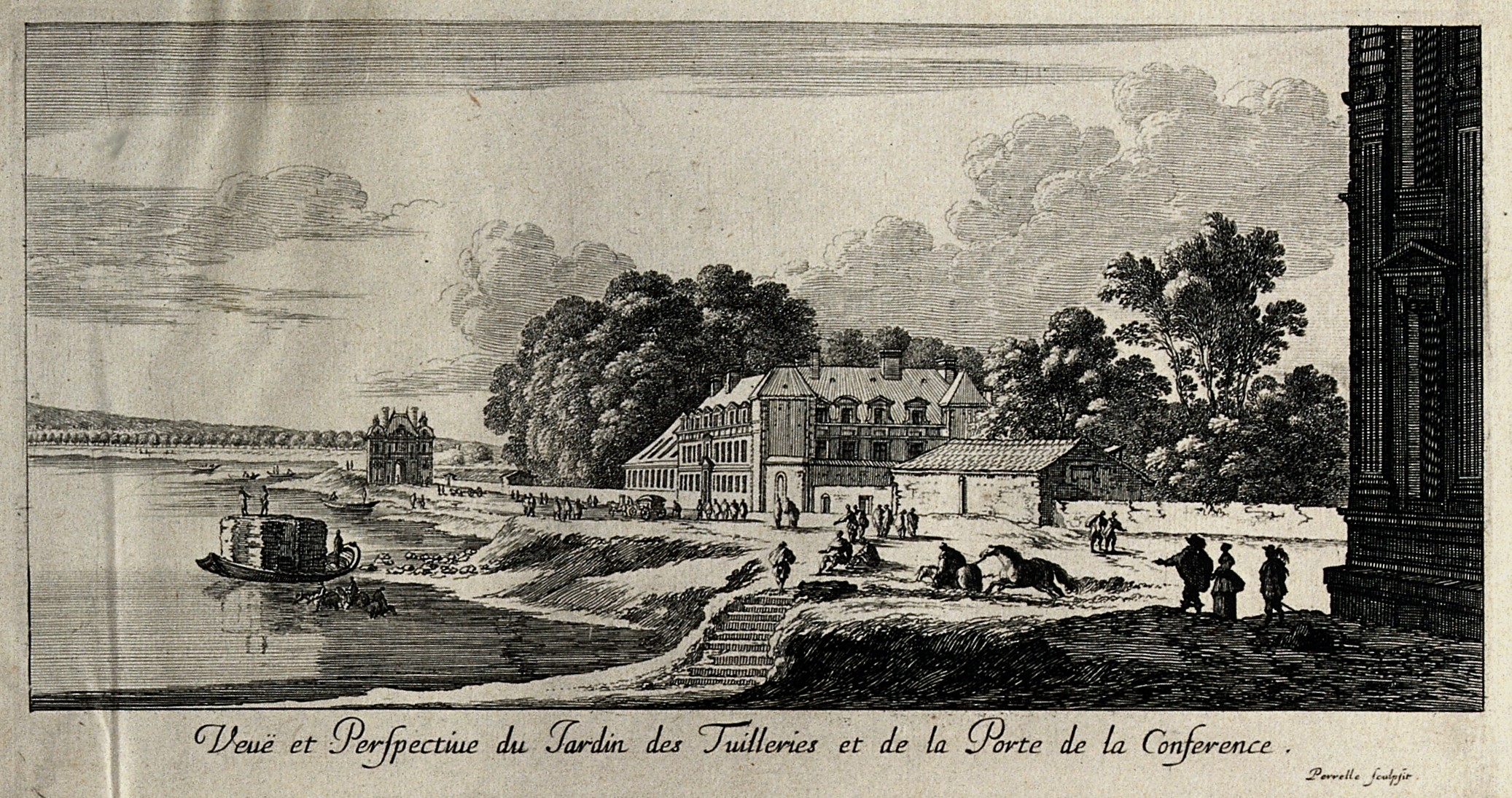 Paris, rive droite de la Seine et Jardin des Tuileries Iconographic Collections Keywords: Adam Perelle